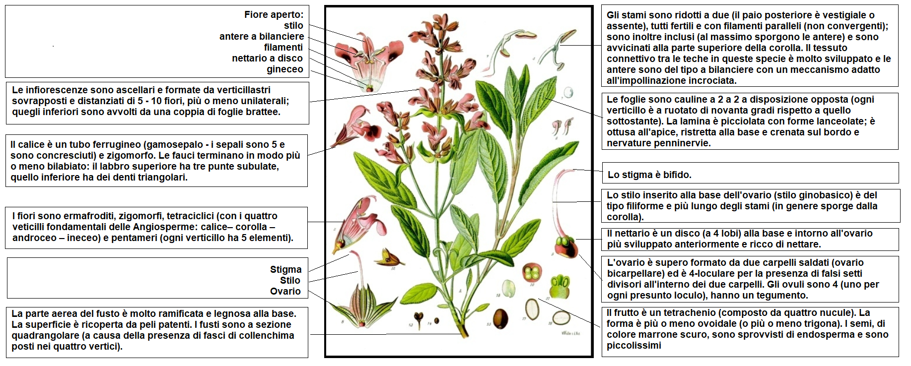 Salvia officinalis - Köhler–s Medizinal-Pflanzen-126